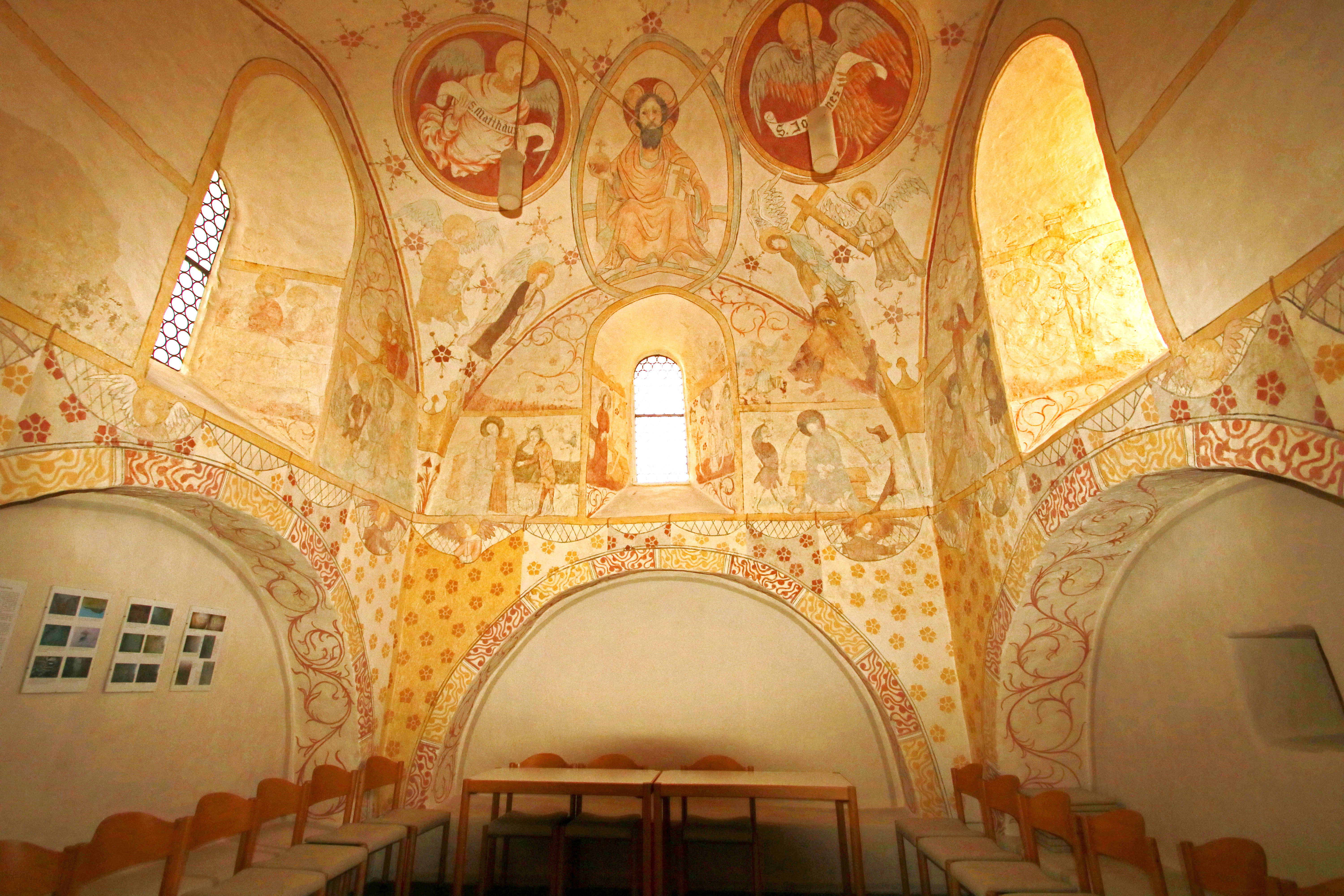 Evangelische Kirche Katzenfurt, Lahn-Dill-Kreis, Hessen, Deutschland